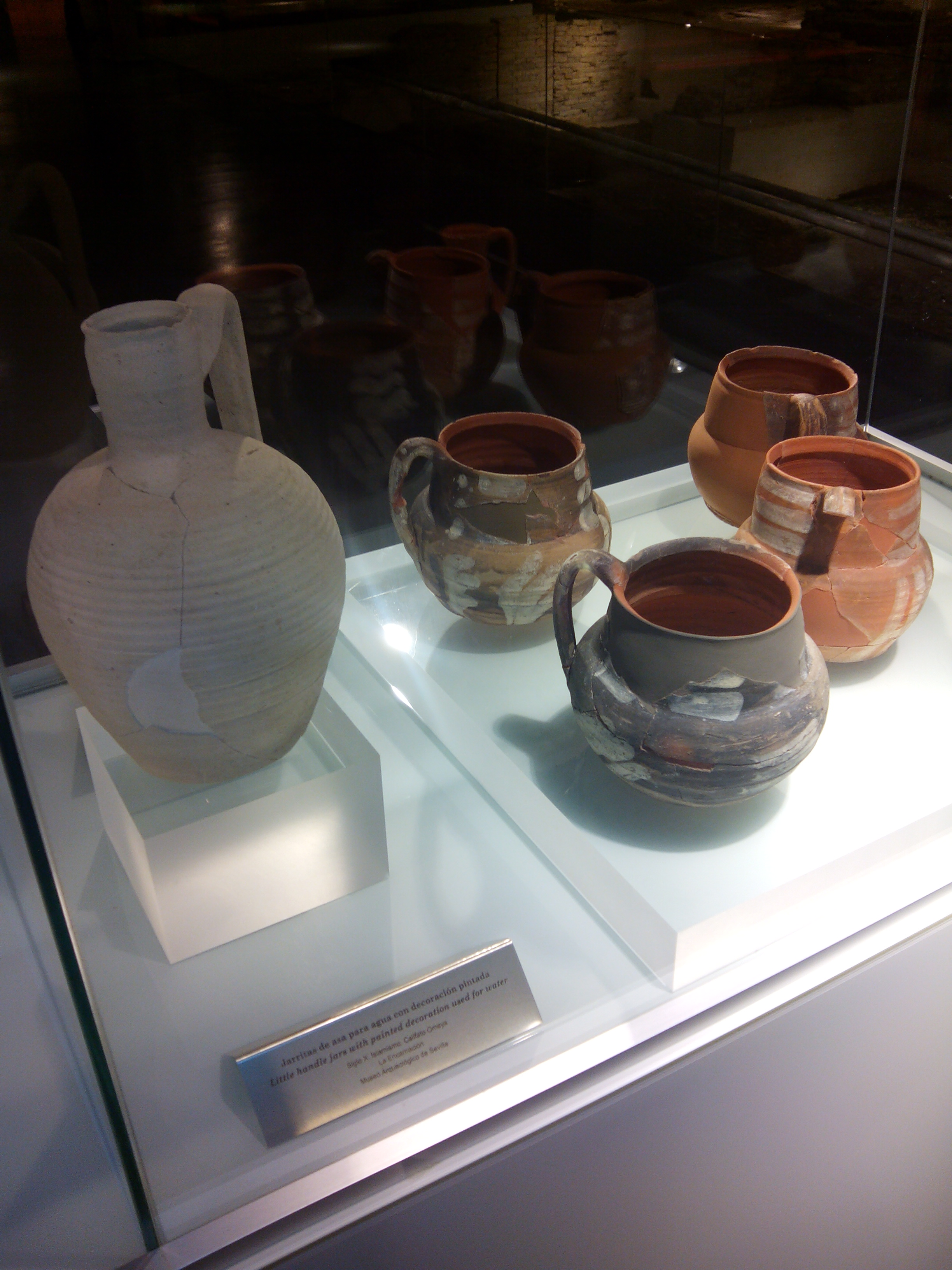 Jarritas de asa para agua con decoración pintada. Siglo X. Islamismo. Califato Omeya.